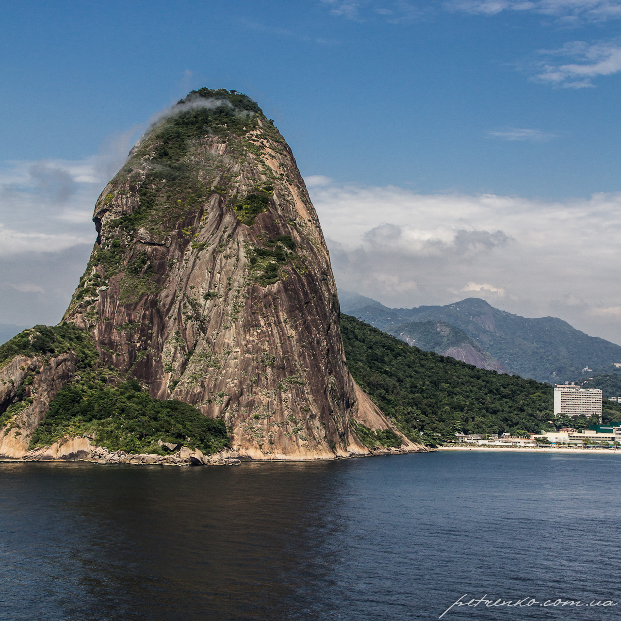 Av. Atlântica, 2 - Copacabana, Rio de Janeiro - RJ, Brazil